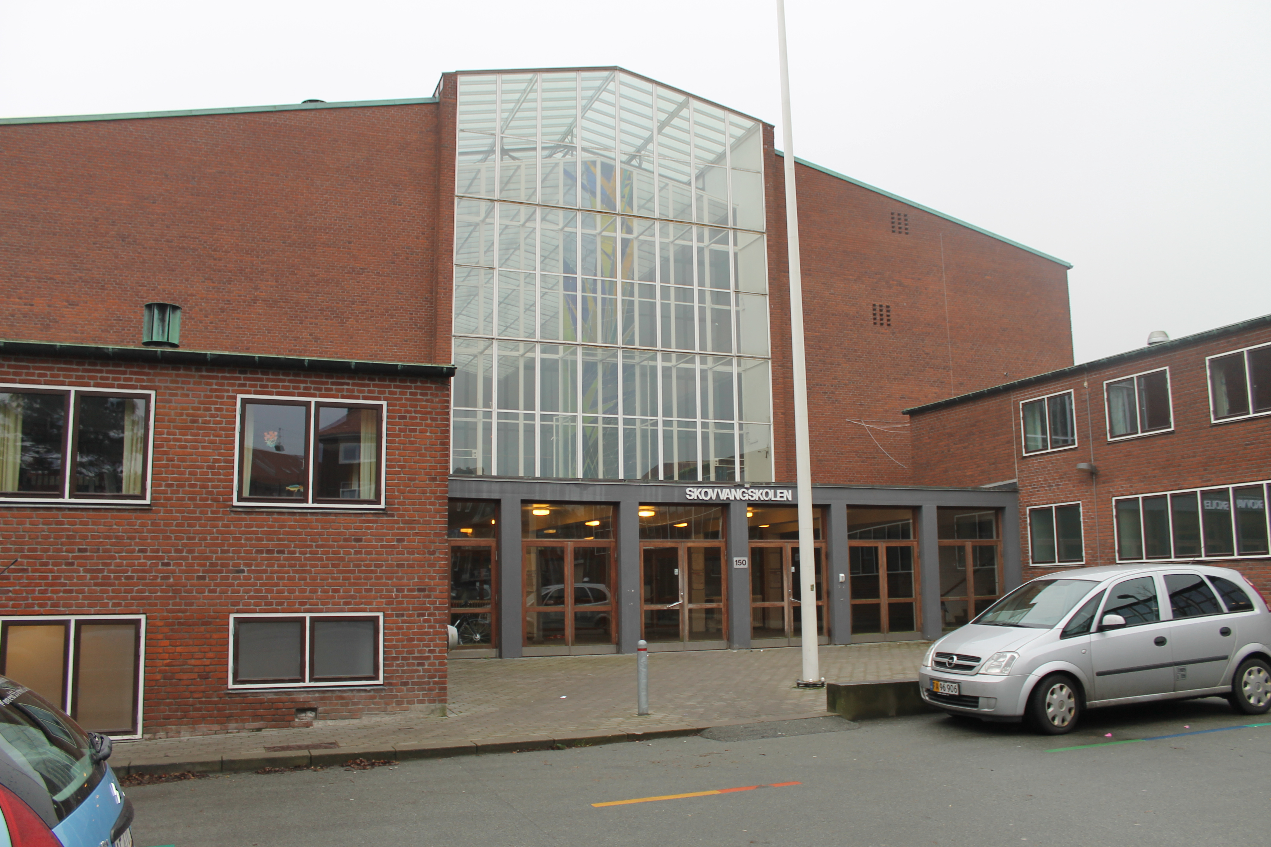 Indgang til Skovvangsskolen fra Skovvangsvej, Aarhus N.